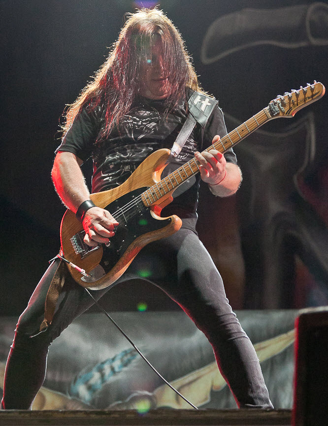 Antonio Romano, guitarrista de Malón